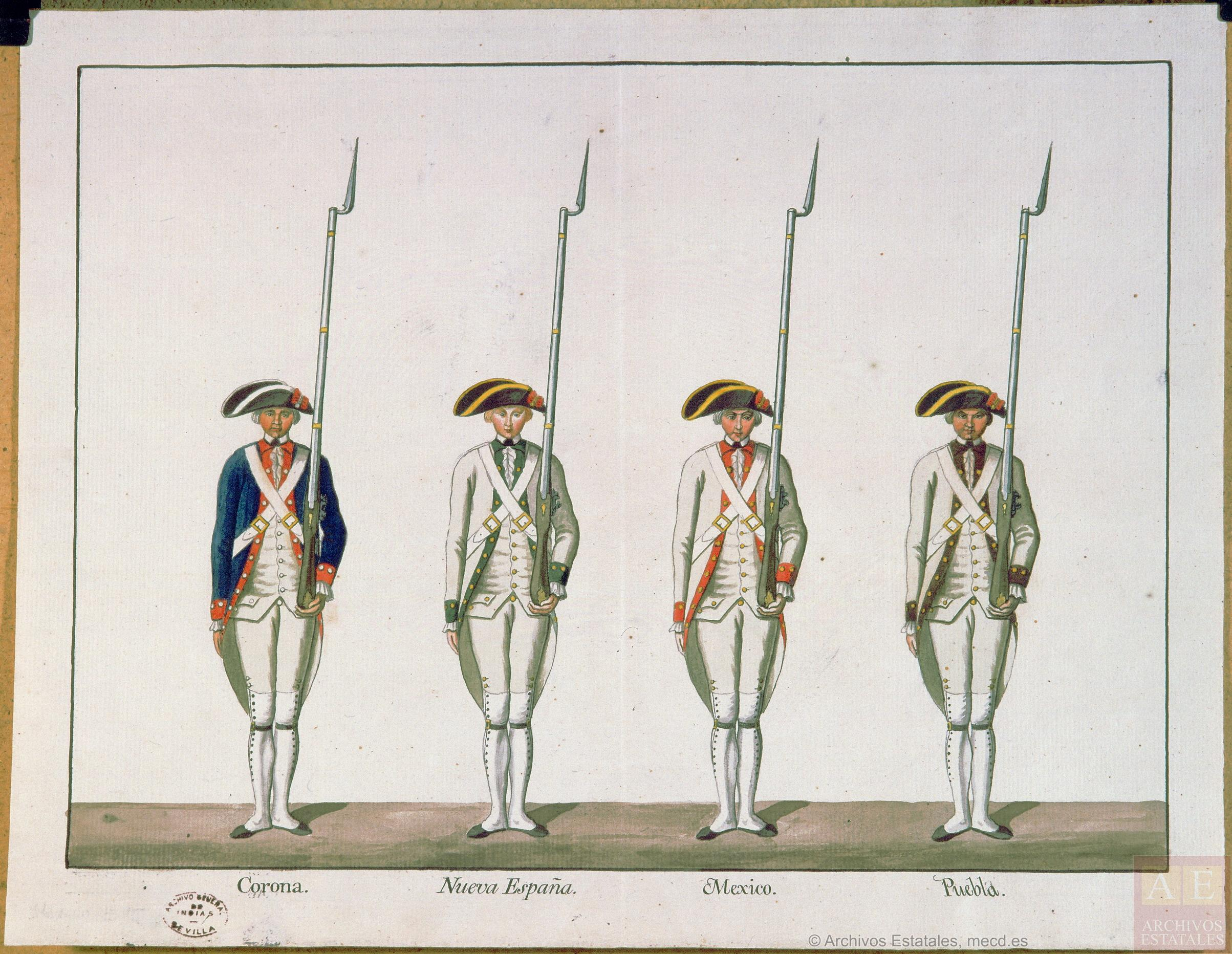 Cuatro diseños de uniformes para los nuevos Regimientos Fijos de Infantería de Nueva España, México y la Puebla, y variación del de la Corona - See more at